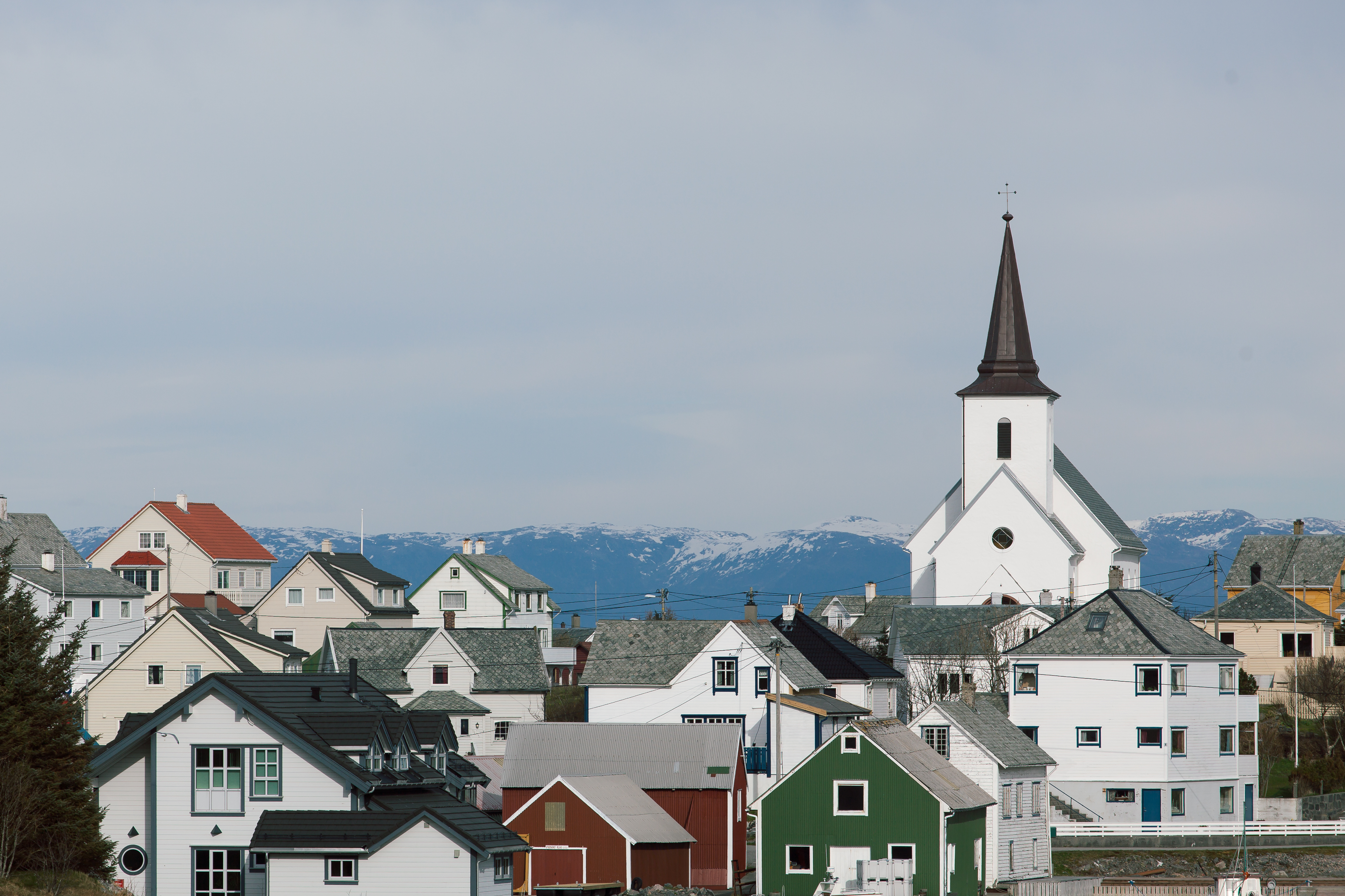 Fedje (April 2014)